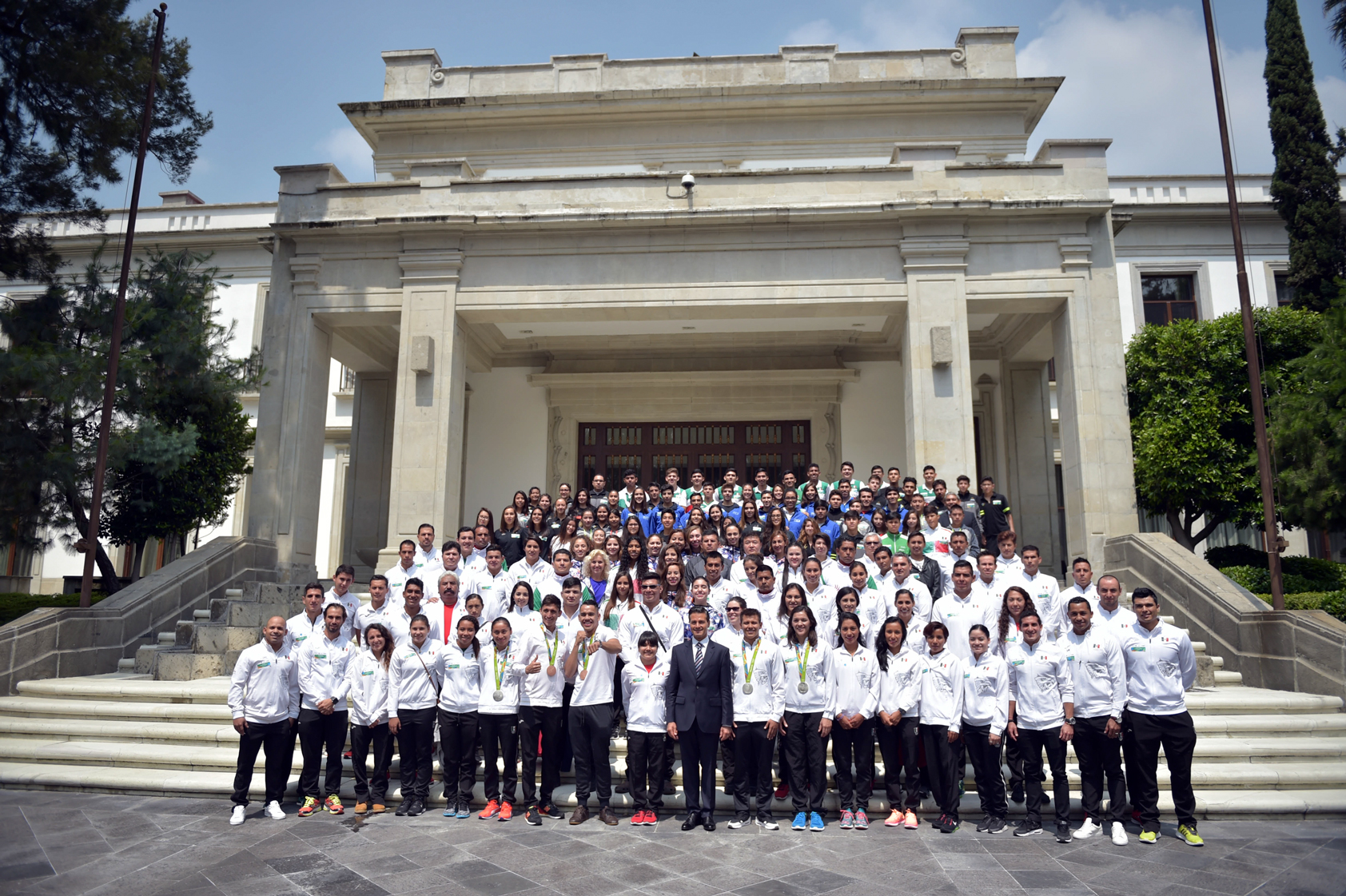 El Presidente Enrique Peña Nieto se reunió hoy con los deportistas que integraron la delegación mexicana que participó en los Juegos Olímpicos de Río de Janeiro 2016, a quienes les expresó su reconocimiento por el esfuerzo, la entrega, el empeño y el coraje que demostraron en esta justa olímpica y durante el proceso para llegar a ella.